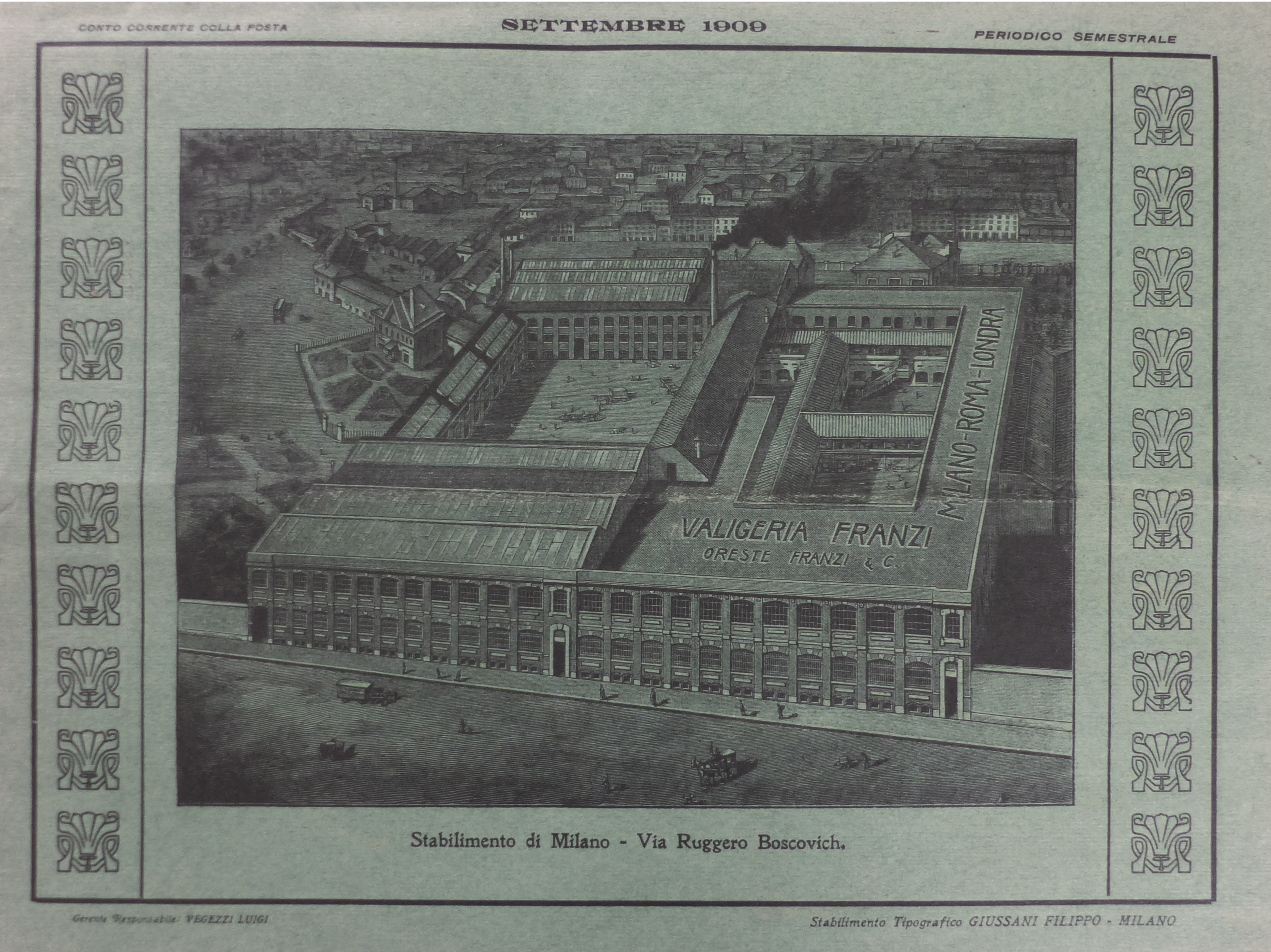 Foto catalogo del 1909 della "Valigeria Franzi"